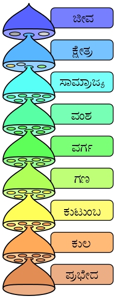 ಕನ್ನಡ: ಜೀವ ವರ್ಗೀಕರಣ